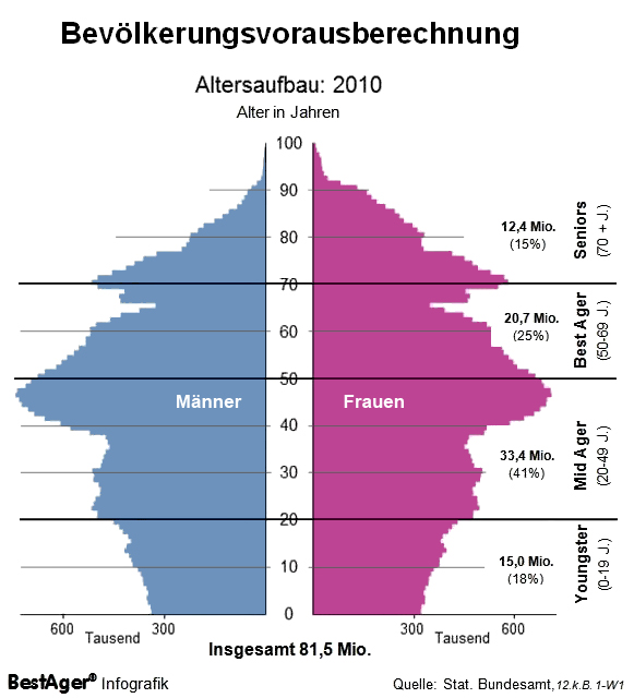 Bevölkerungsvorausberechnung des statistischen Bundesamtes für 2010. editierte Grafik mit eigener Einteilung